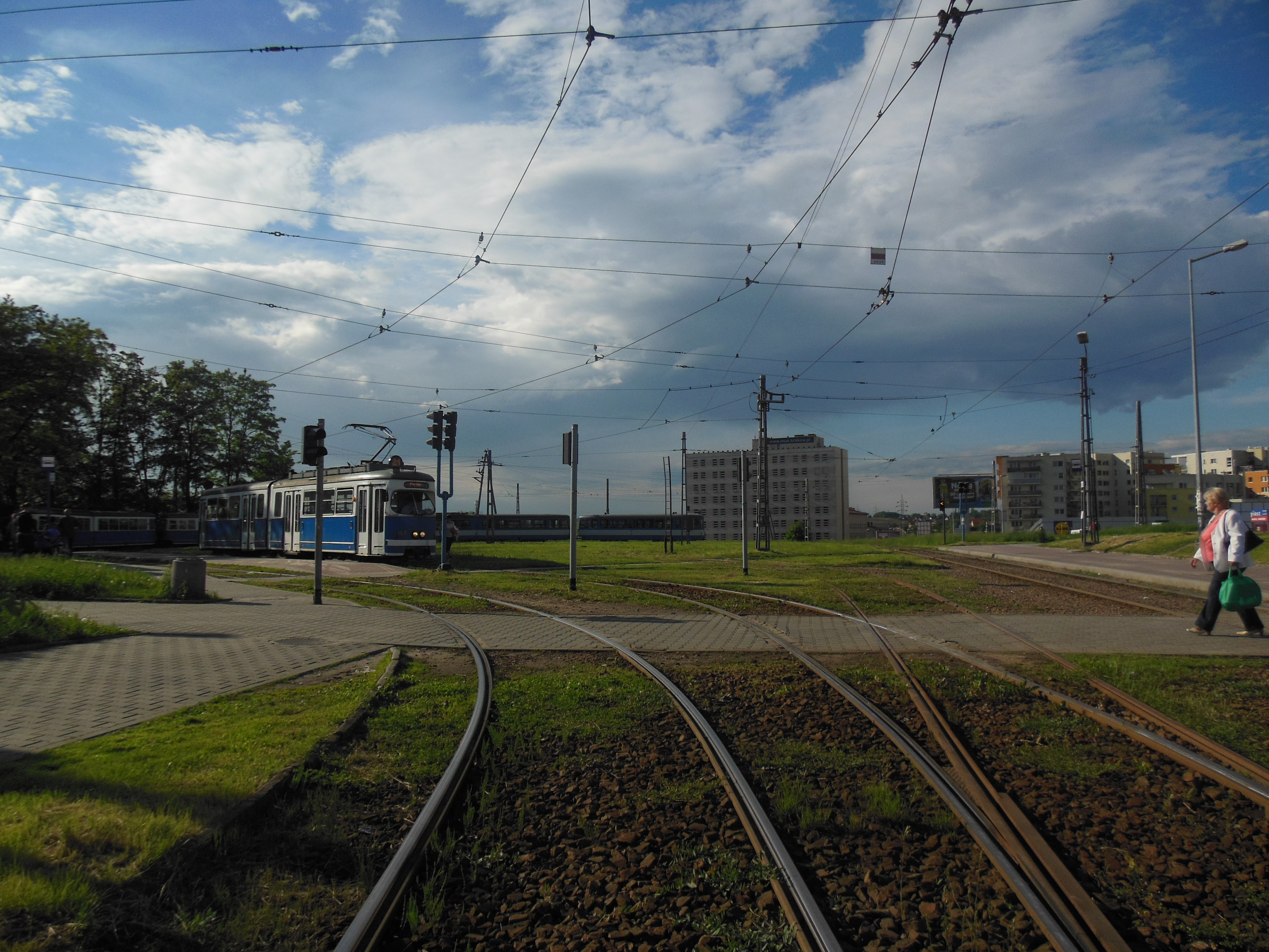 Pętla tramwajowa "Os. Piastów" w Krakowie. Wbrew nazwie ta pętla jest na Osiedlu Bohaterów Września.